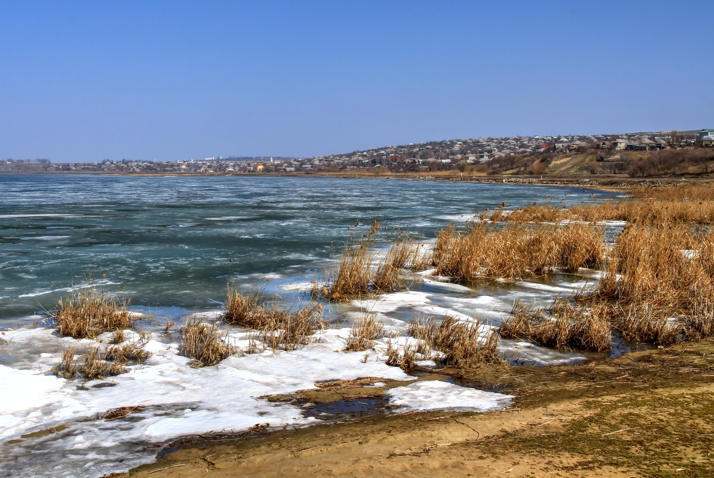 Озера Нижнего Прута (№ 1029 в Рамсарском списке), монумент природы, находится в Район Кахул(код MD-CH-zu-001)